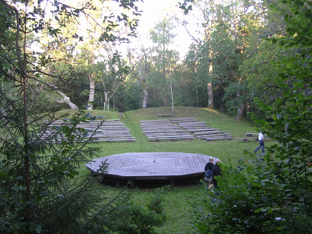 Sadulamägi